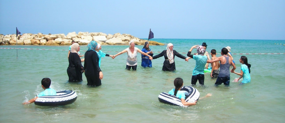 אדם ללא גבולות יום כיף